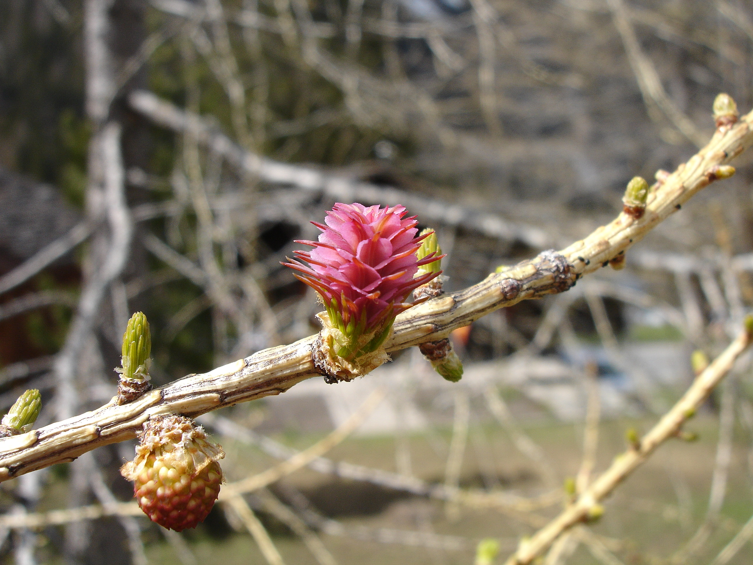 Fleur de mélèze